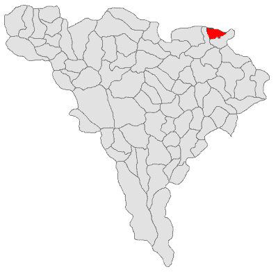 Categorie:Hărţi ale judeţului Alba